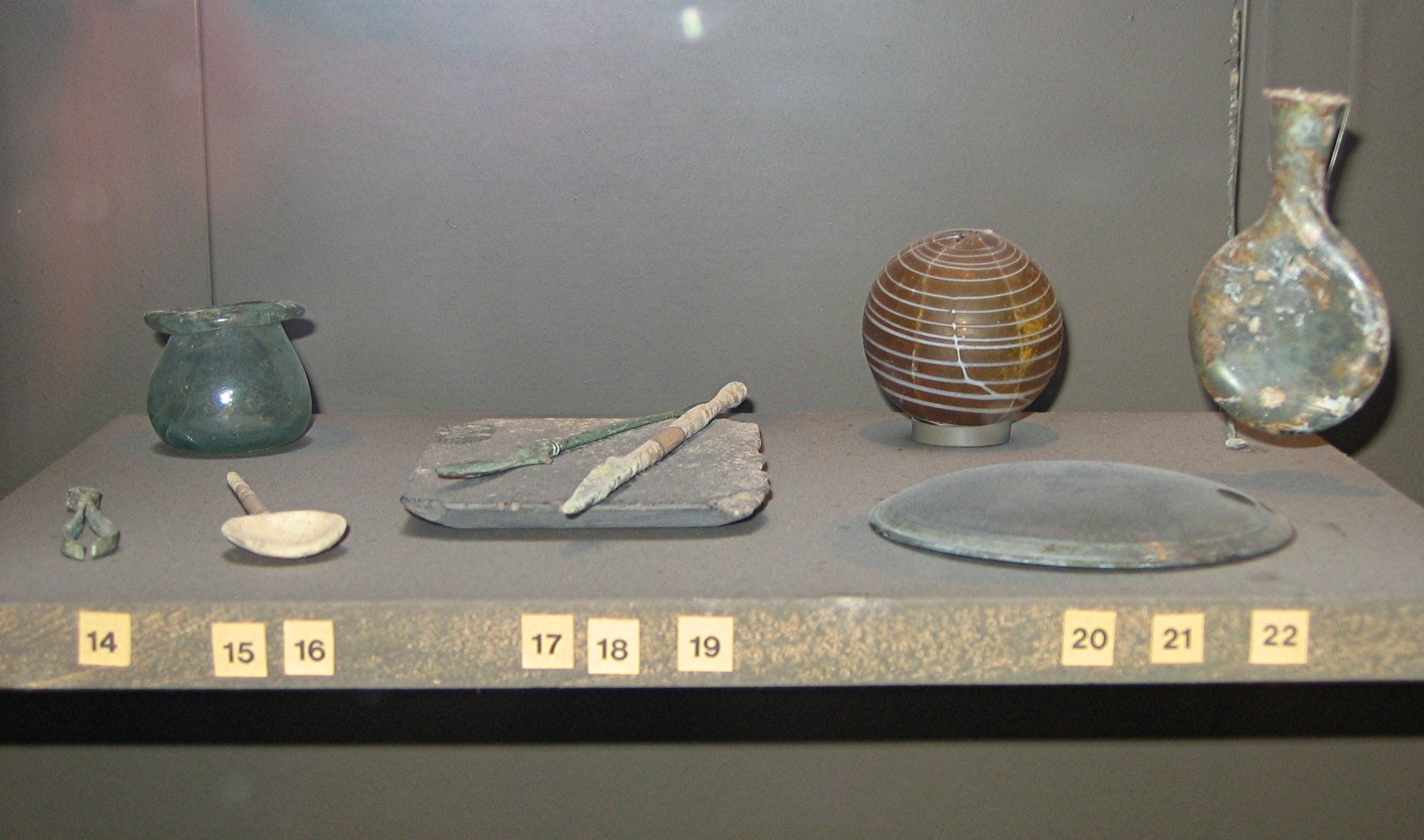 Objets romains retrouvés au Vieil-Évreux, conservés au musée d'Évreux